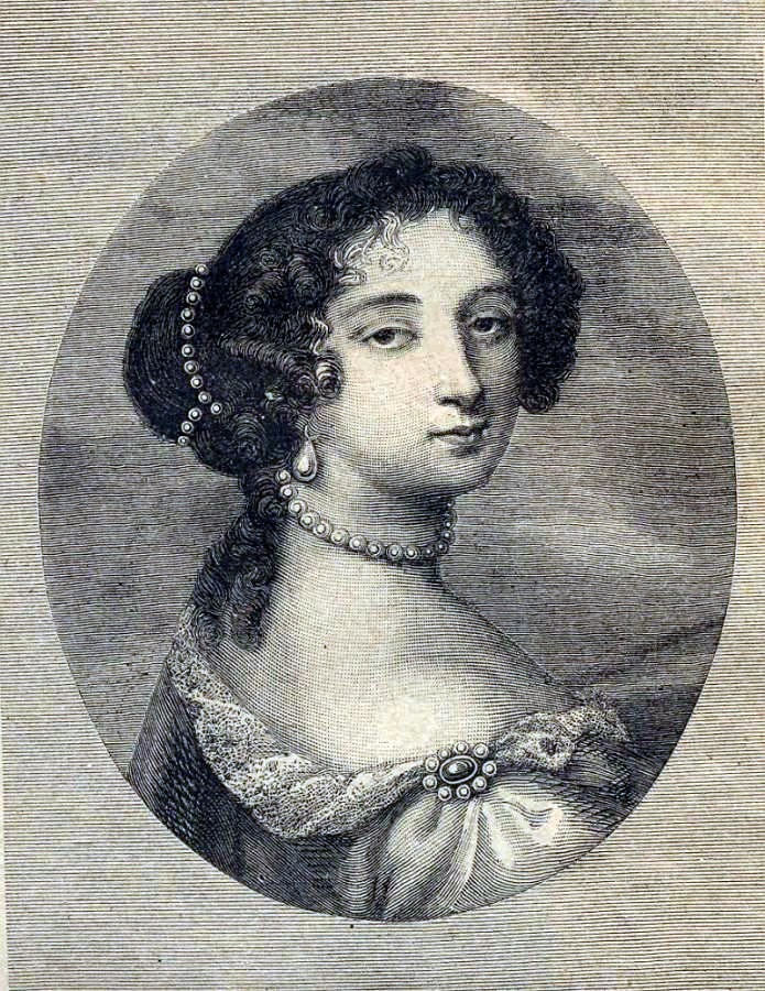 Françoise d'Aubigné, marquise de Maintenon, épouse secrète du roi de France Louis XIV.